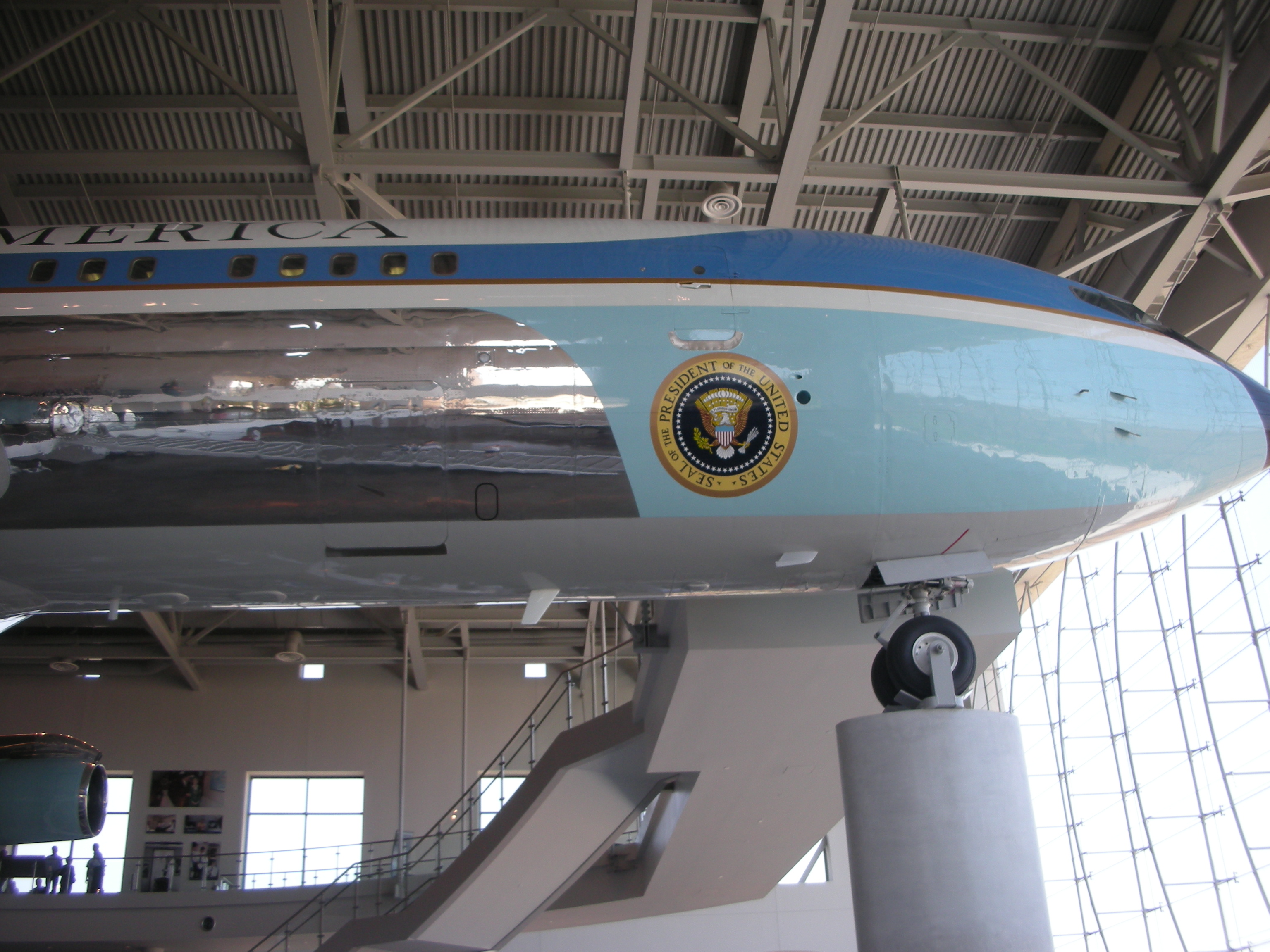 Pavilion Air Force One Biblioteca y Museo Presidencial de Ronald Reagan. Simi Valley, California